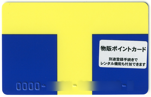 TSUTAYAで発行されるクレジット機能なしTカードのうち、レンタル機能なしのもの（物販ポイントカード）の一例。